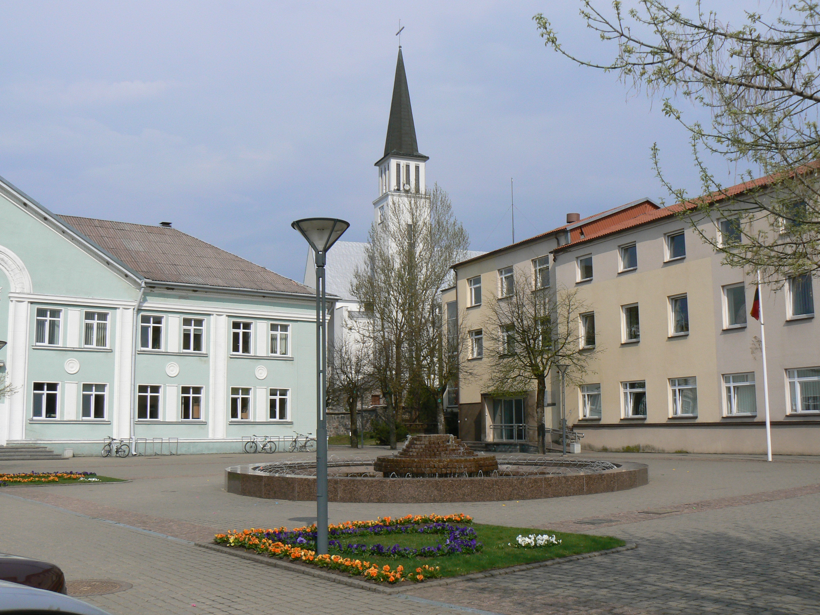 Gargždai, náměstí s vodotryskerm před budovami Hudební školy a radnicí, v pozadí kostel Sv. Archanděla Mikuláše.